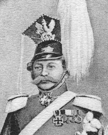 Karl Bernhard von Stülpnagel, Kommandeur Ulanen-Regiment „Großherzog Friedrich von Baden“ (Rheinisches) Nr. 7